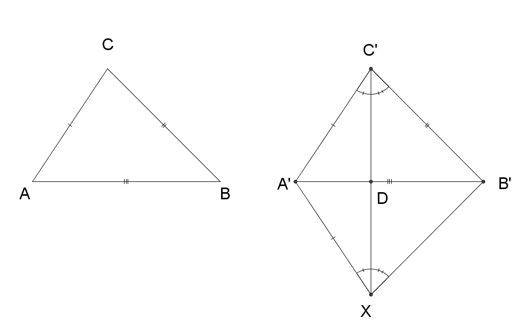 Imagem suporte para demonstração do caso de congruência triangular lado-lado-lado